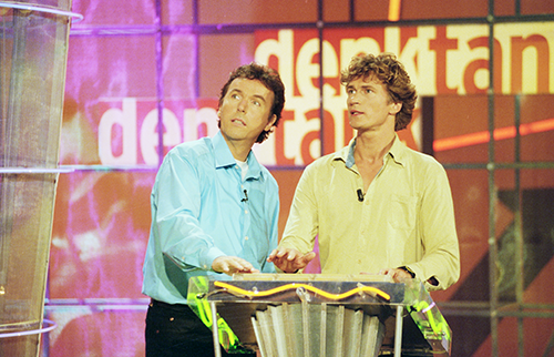 Setfoto's van Denktank: Kas van Iersel & Herman Boerman